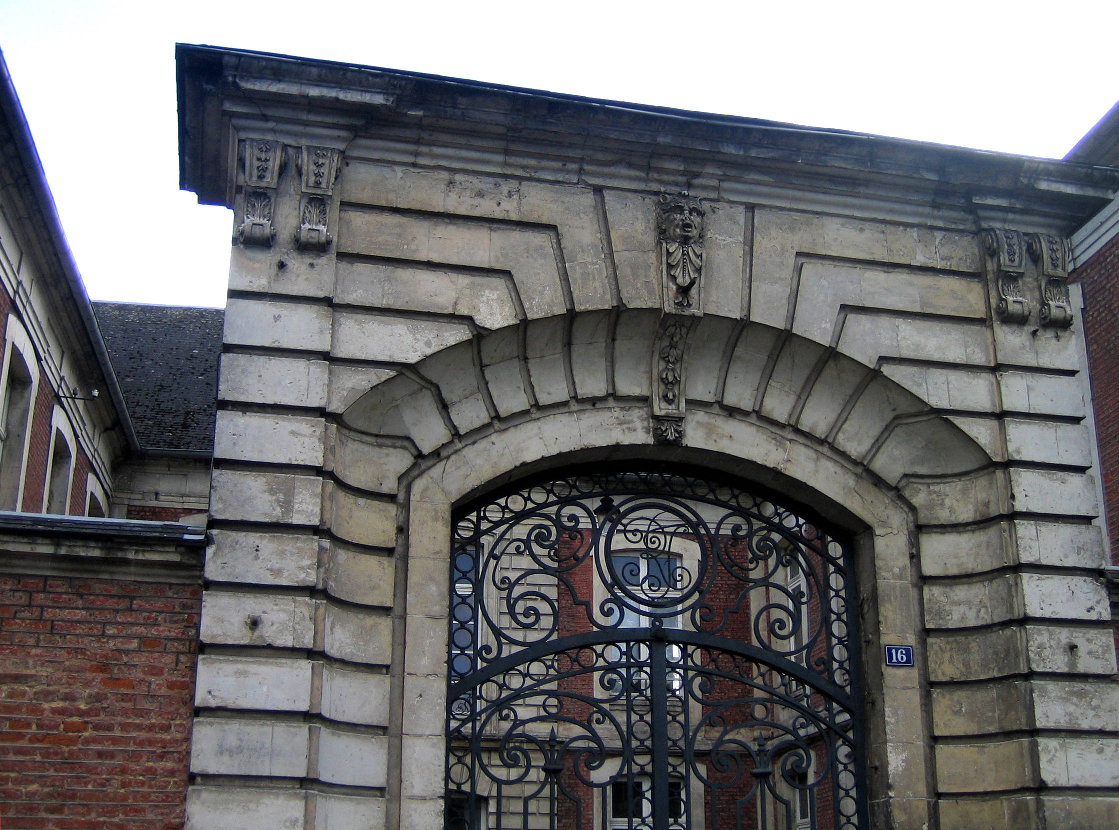 Doullens (Somme, France) - L'entrée de l'ancienne sous-préfecture, dans la Rue Clémenceau. La grille de fer forgé comporte en haut au centre un cercle entourant les initiales "RF" (abréviation de République Française).